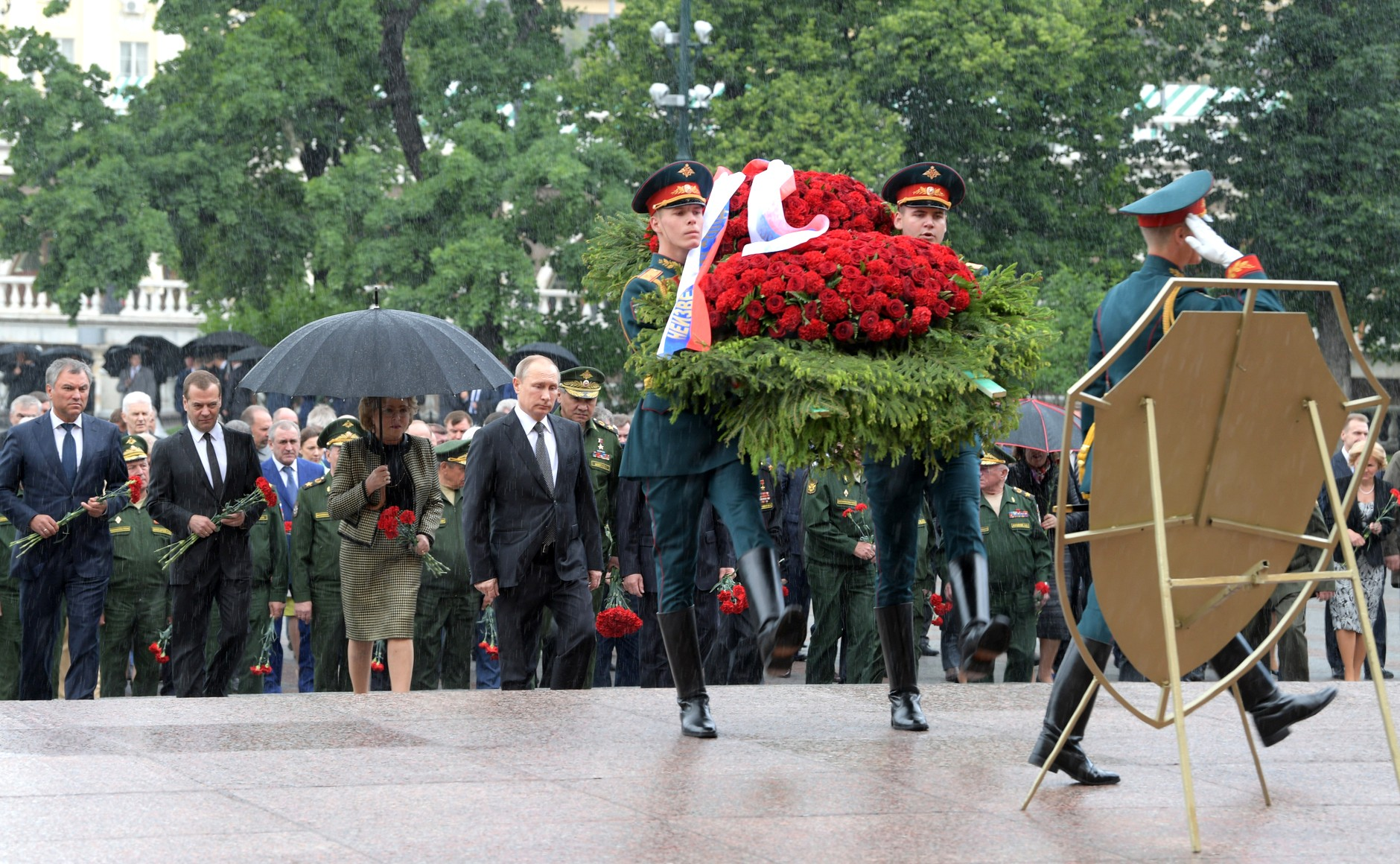 Возложение венка к Могиле Неизвестного Солдата.